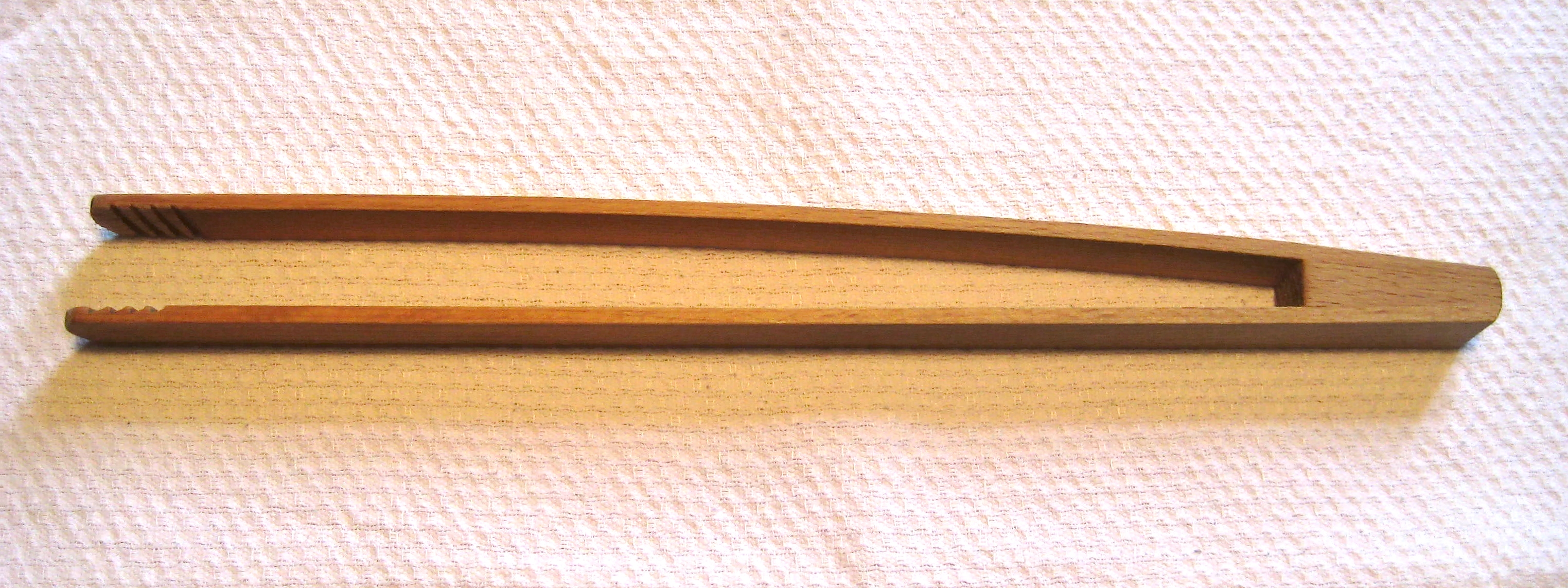 Grillzange (Wurstzange) aus Buchenholz. Länge = 32 Zentimeter.